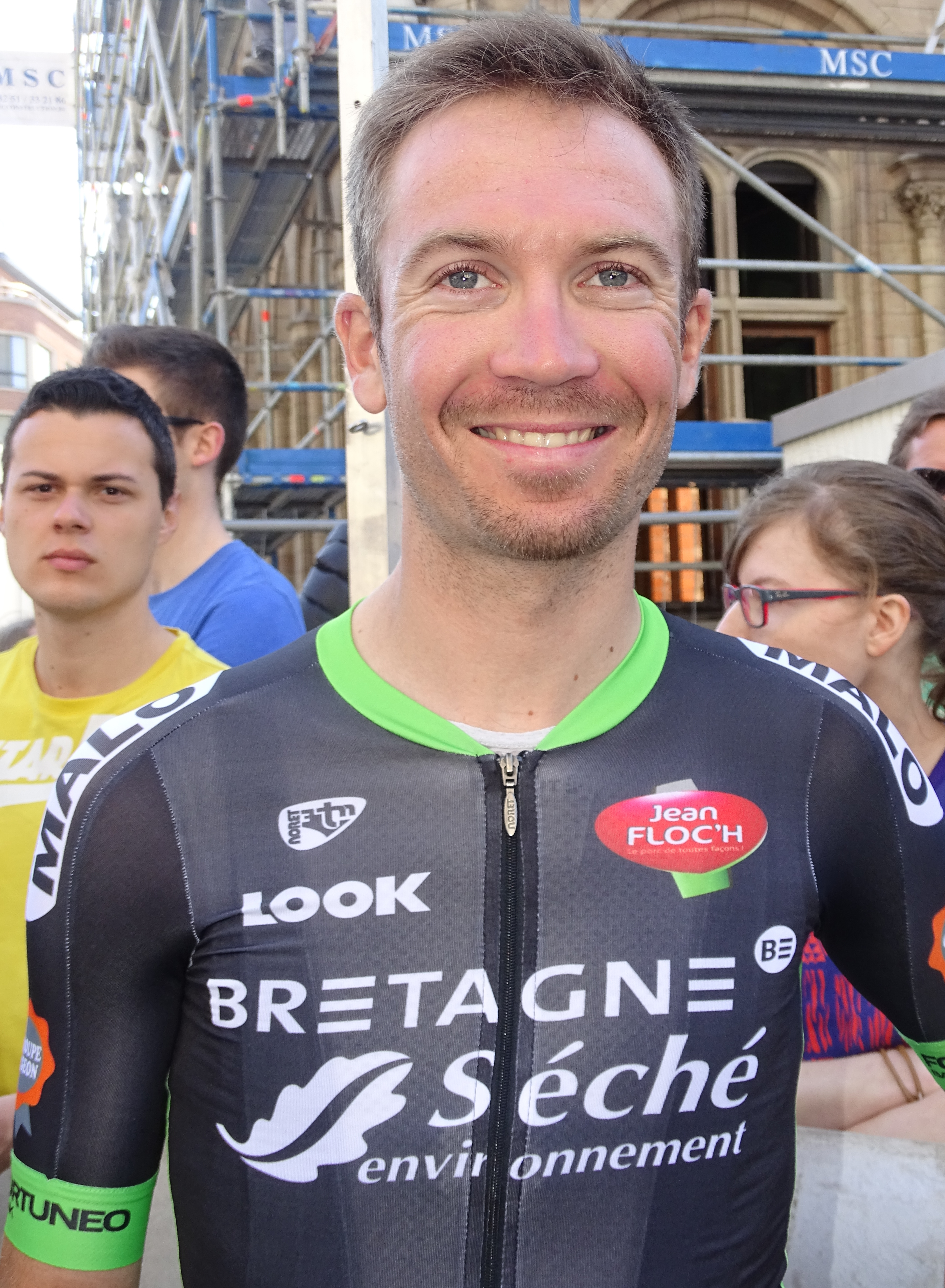 Reportage réalisé le mercredi 15 avril à l'occasion du départ de la Flèche brabançonne 2015 à Louvain, Belgique.